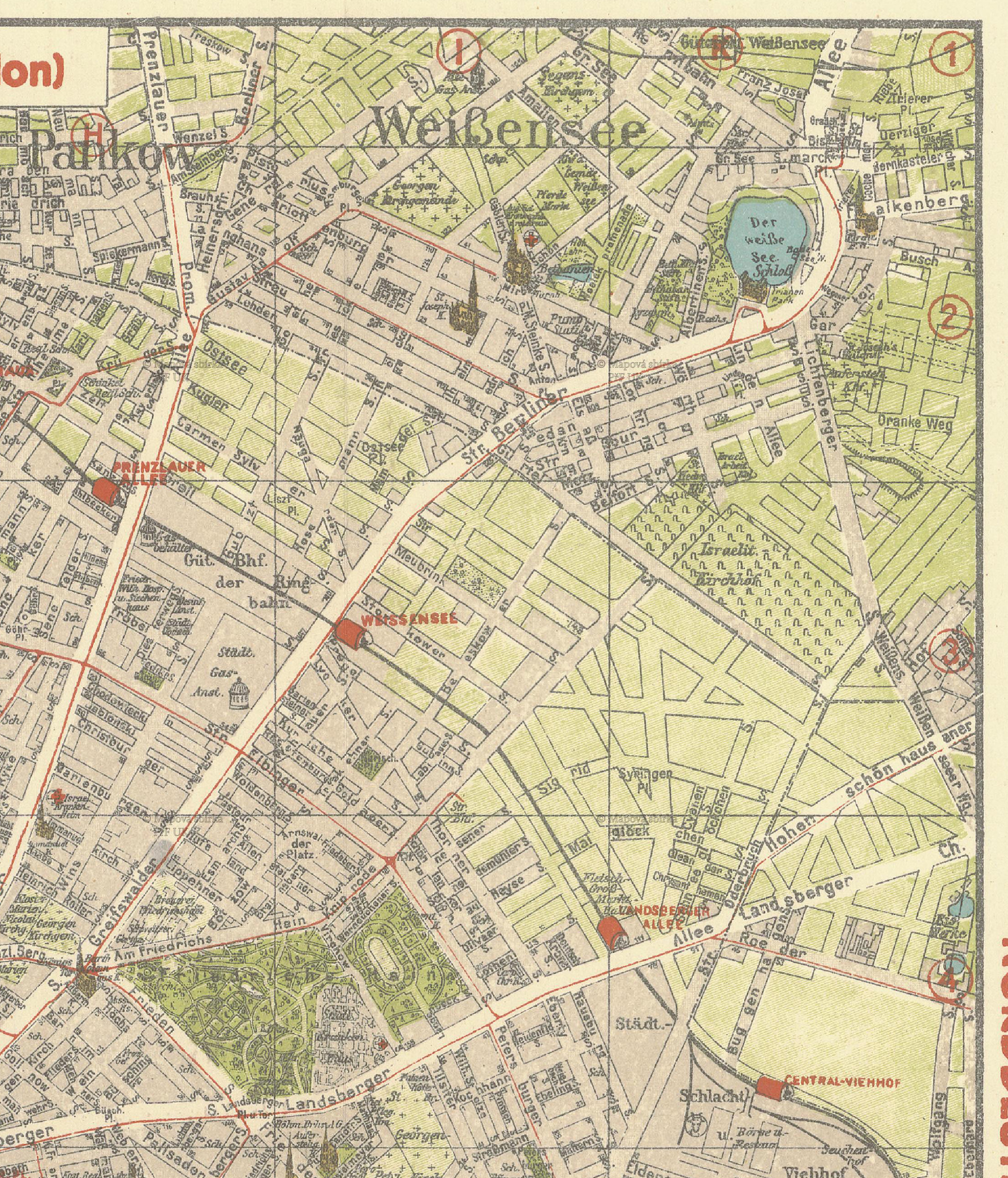 Kleine Ausgabe mit Vororten